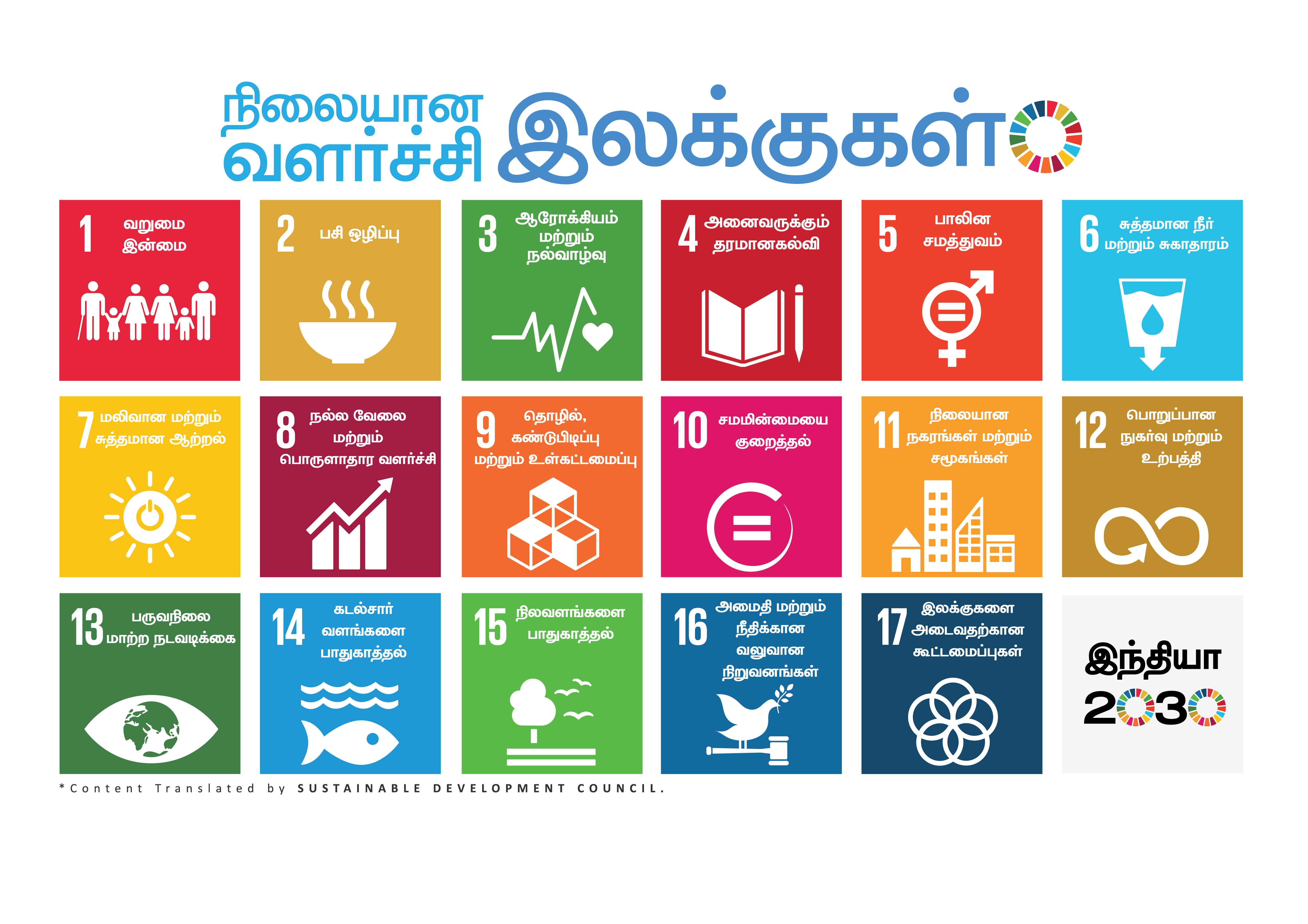 Tamil version of Sustainable Development Goals